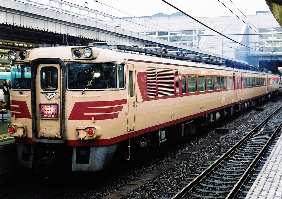 JR西日本 キハ181系特急形気動車 臨時特急 かにカニ鳥取